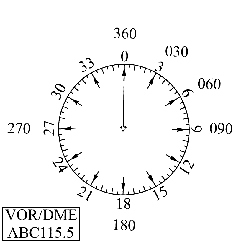 selbst gezeichnet